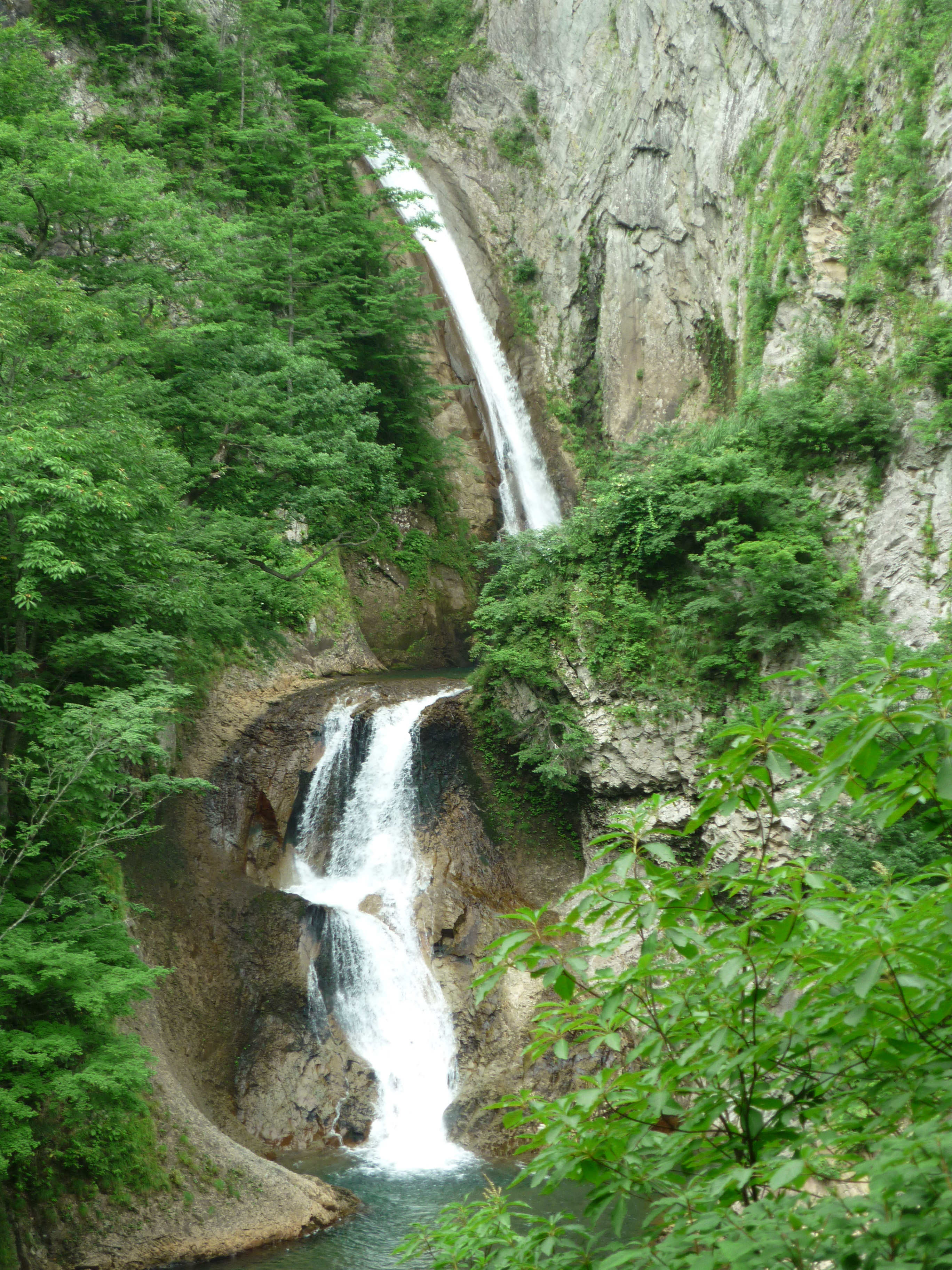 Matsumi Falls